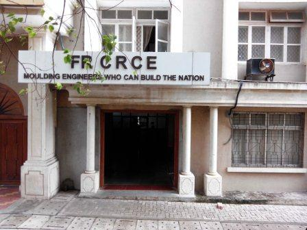 Fr. Conceicao Rodrigues College of Engineering, Bandra, Mumbai